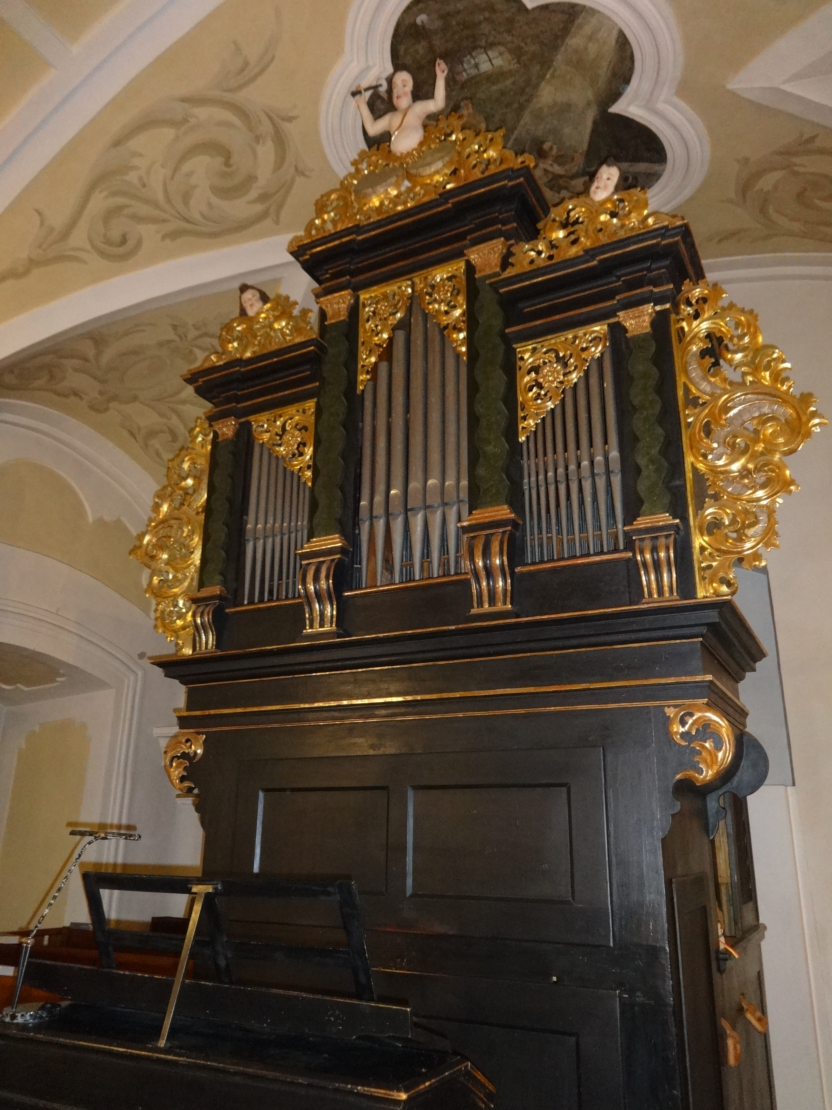 Die Orgel der Pfarrkirche St. Johann am Wimberg in OÖ.